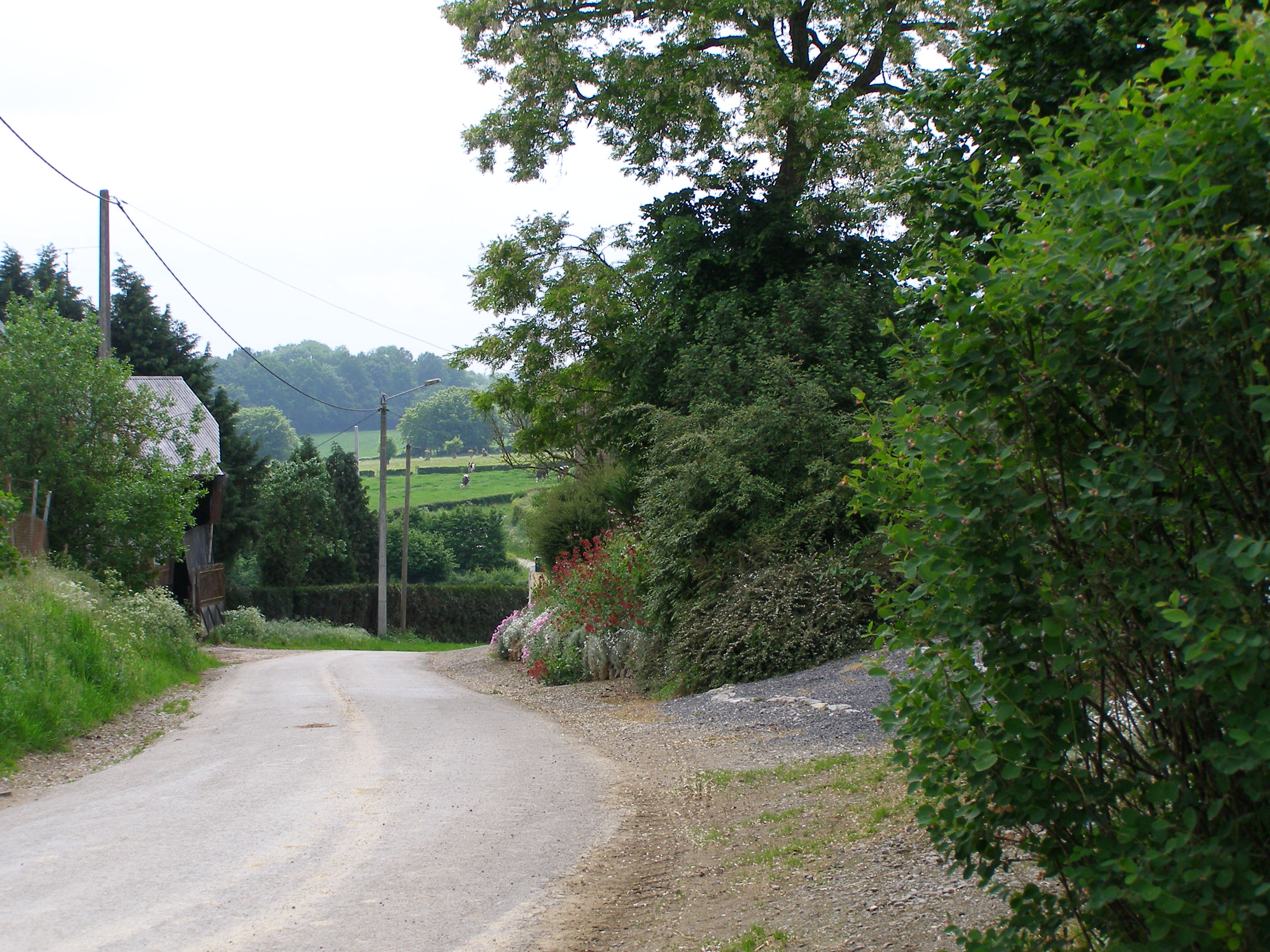 Le haut de Damousies et vue sur la campagne.